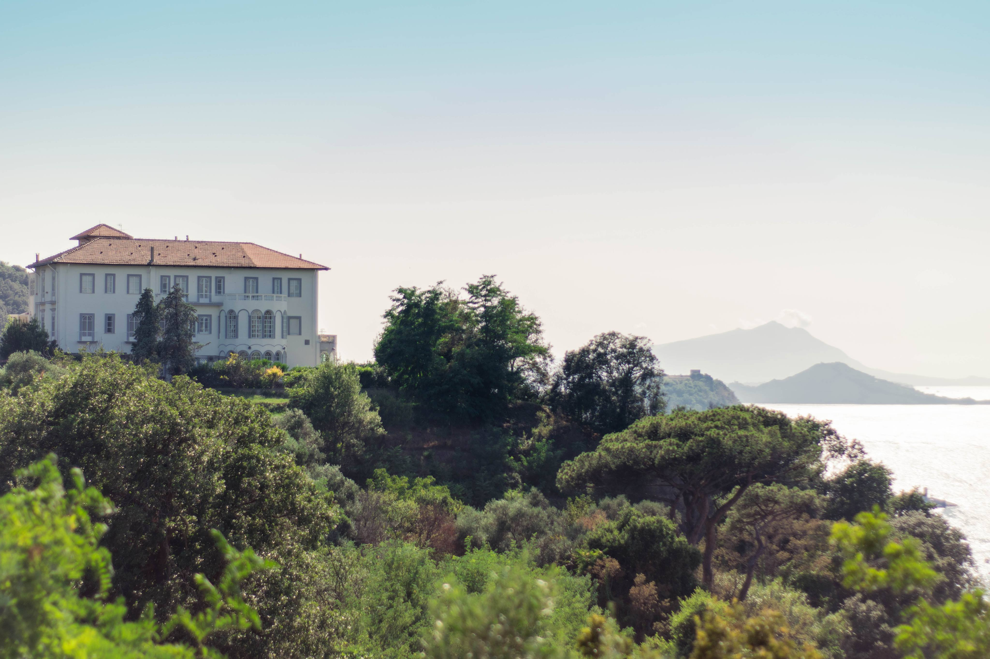 Villa in viale Virgilio n.14